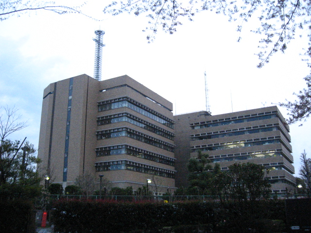 武蔵野市役所